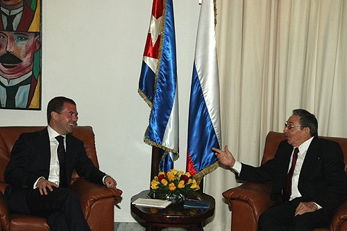 Встреча на Кубе Д.Медведева с Р.Кастро.